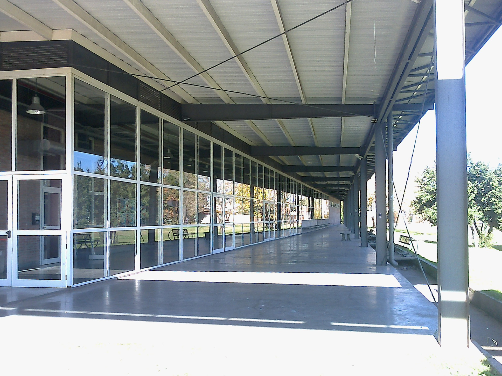 Galería lateral en el Edificio Ugarte de la Universidad Nacional de Lanús.